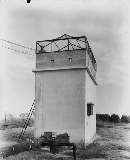 מושב צופית נוטר במגדל שמירה 1939 אוסף זולטן קלוגר גנזך המדינה